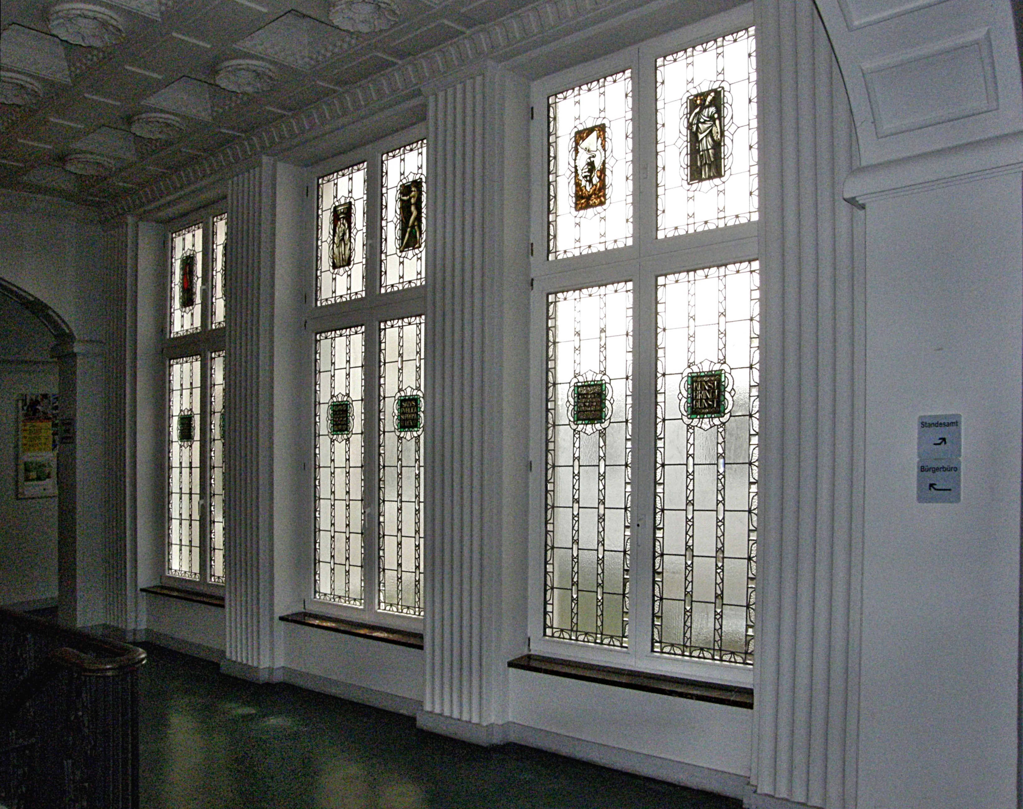 Schneeberg, Rathaus: Fenster